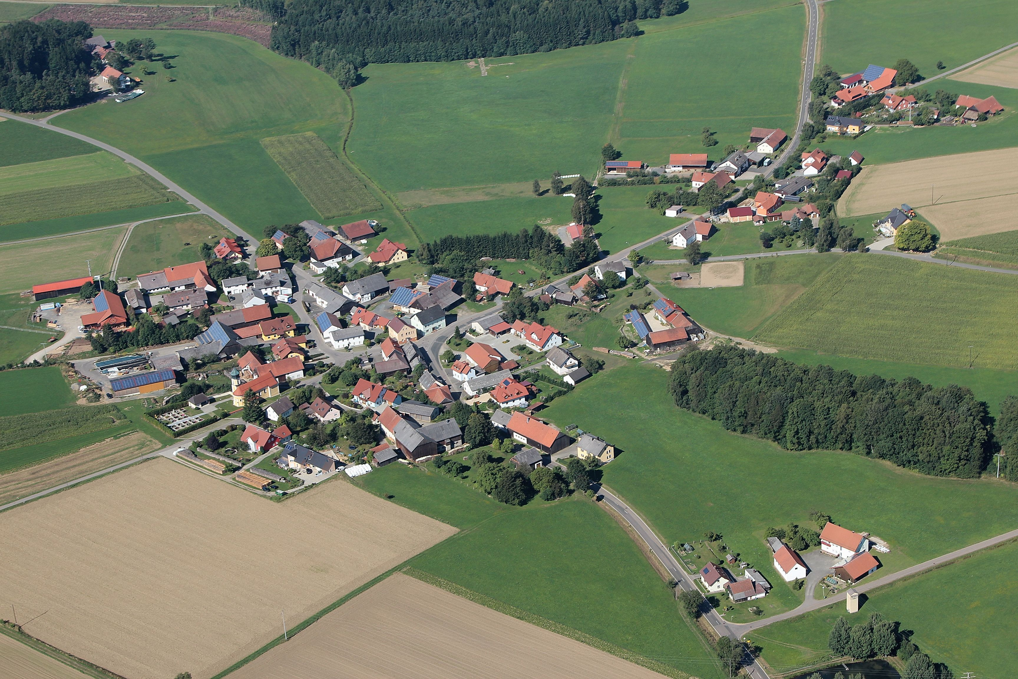 Haag; Markt Winklarn, Landkreis Schwandorf, Oberpfalz, Bayern